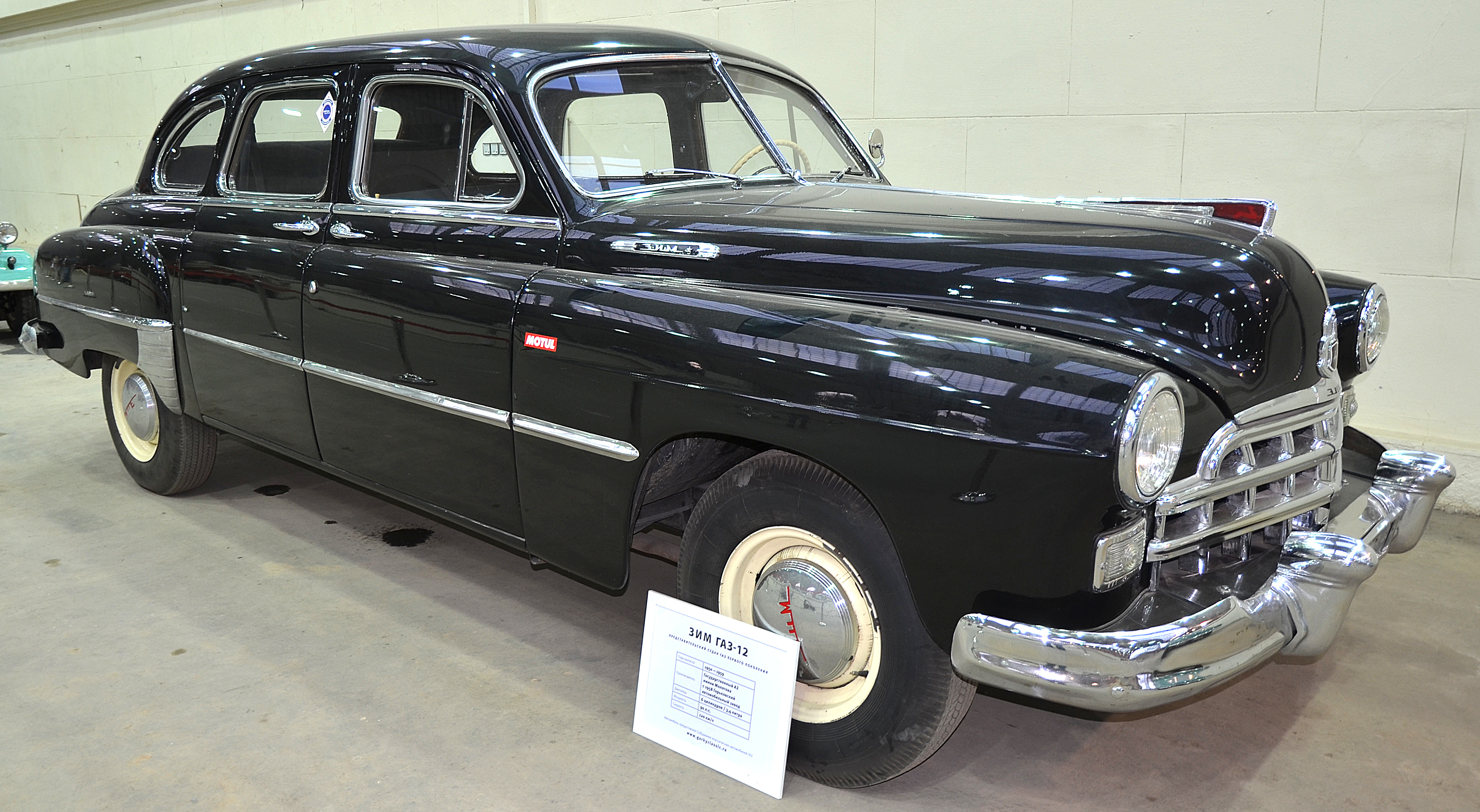 Можно увидеть здесь : You can see here